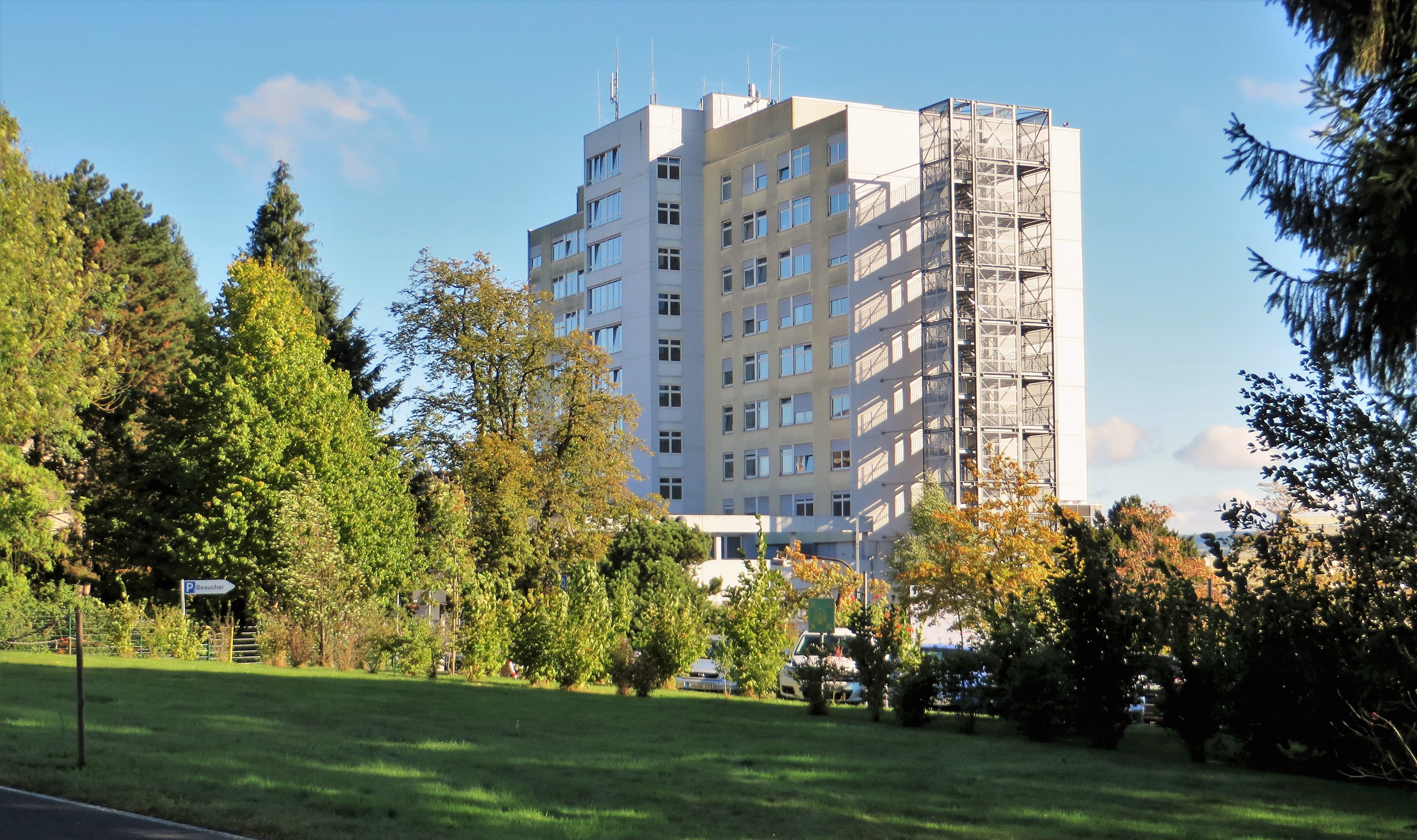 Neubau von 1972 neben dem ersten Krankenhaus von 1902/04